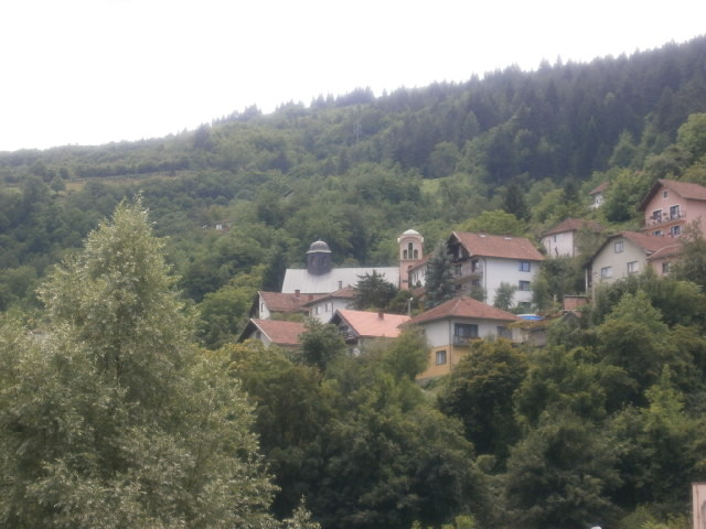 Амбијентална цјелина Ћерезлук Сликава е подигната во рамките на проектот „По трагата на душата 2015“.